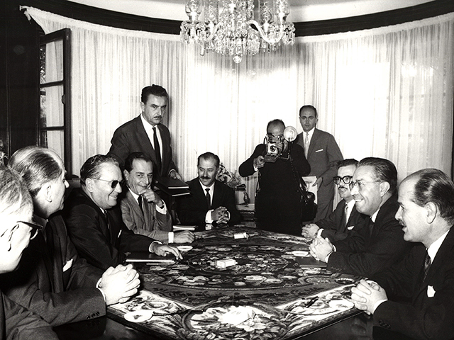 Srpski (latinica): Zvanični jugoslovensko-bolivijski razgovori, Kočabamba 30.09.1963. Inventarski broj:1963_226_115